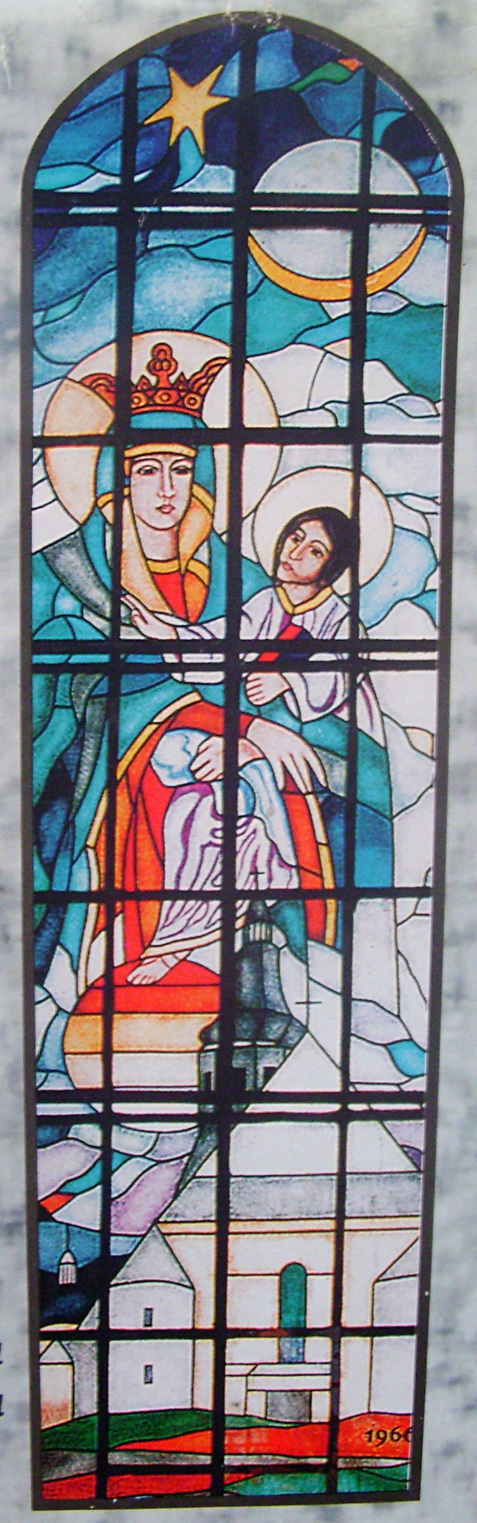 Matka Boża Bączalska - witraż w kościele Imienia Maryi w Bączalu Dolnym (diecezja rzeszowska)